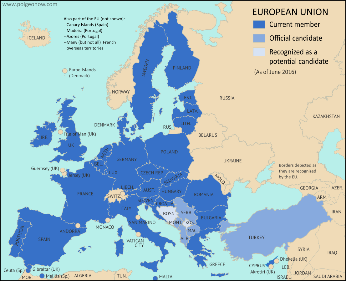 Europska Unija 2018.